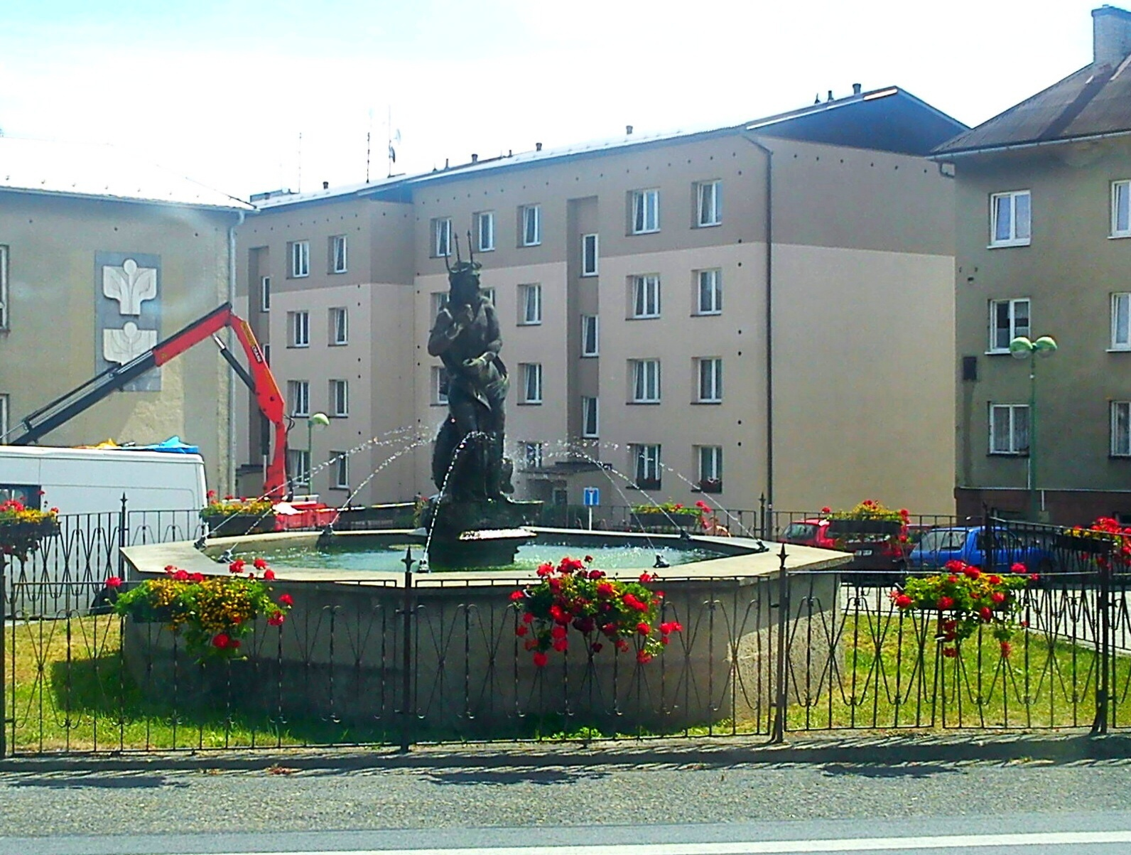 Kašna se sochou Neptuna (Dvorce), nám., Dvorce